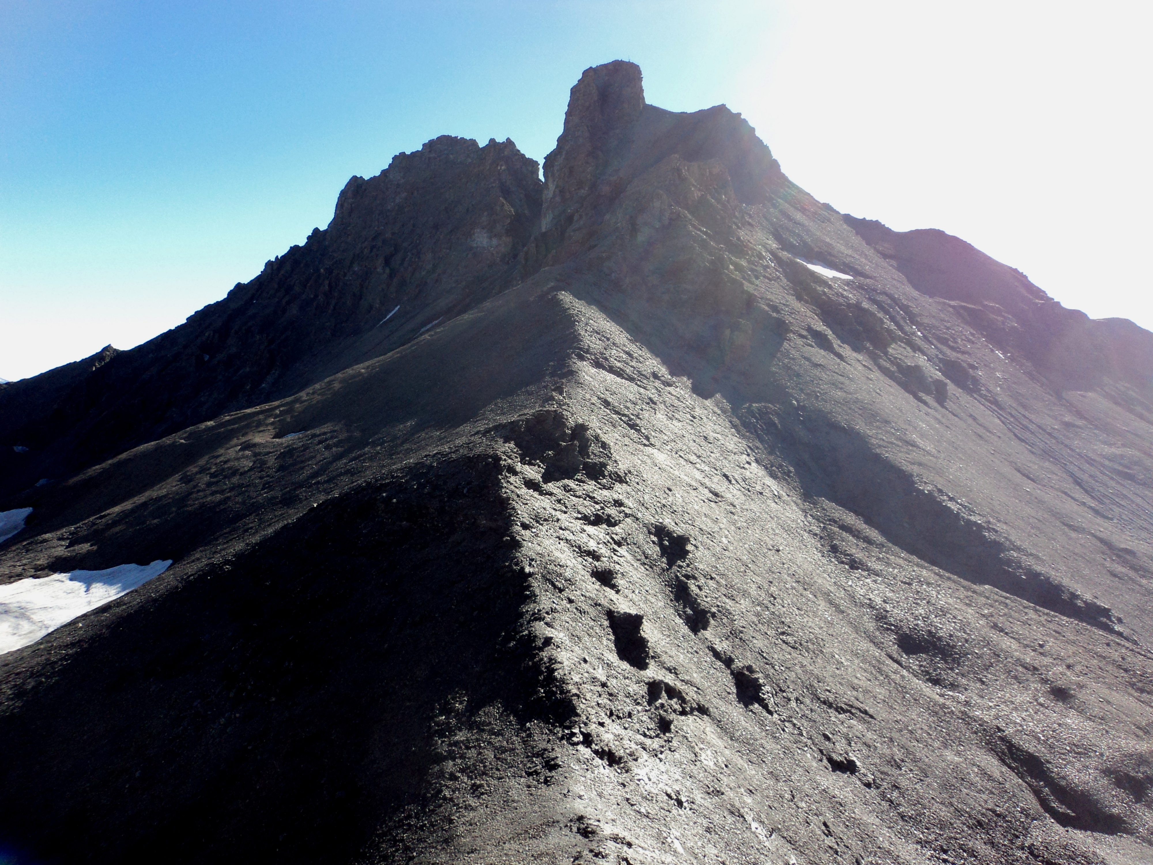 La cresta ovest che conduce al torrione sommitale della montagna